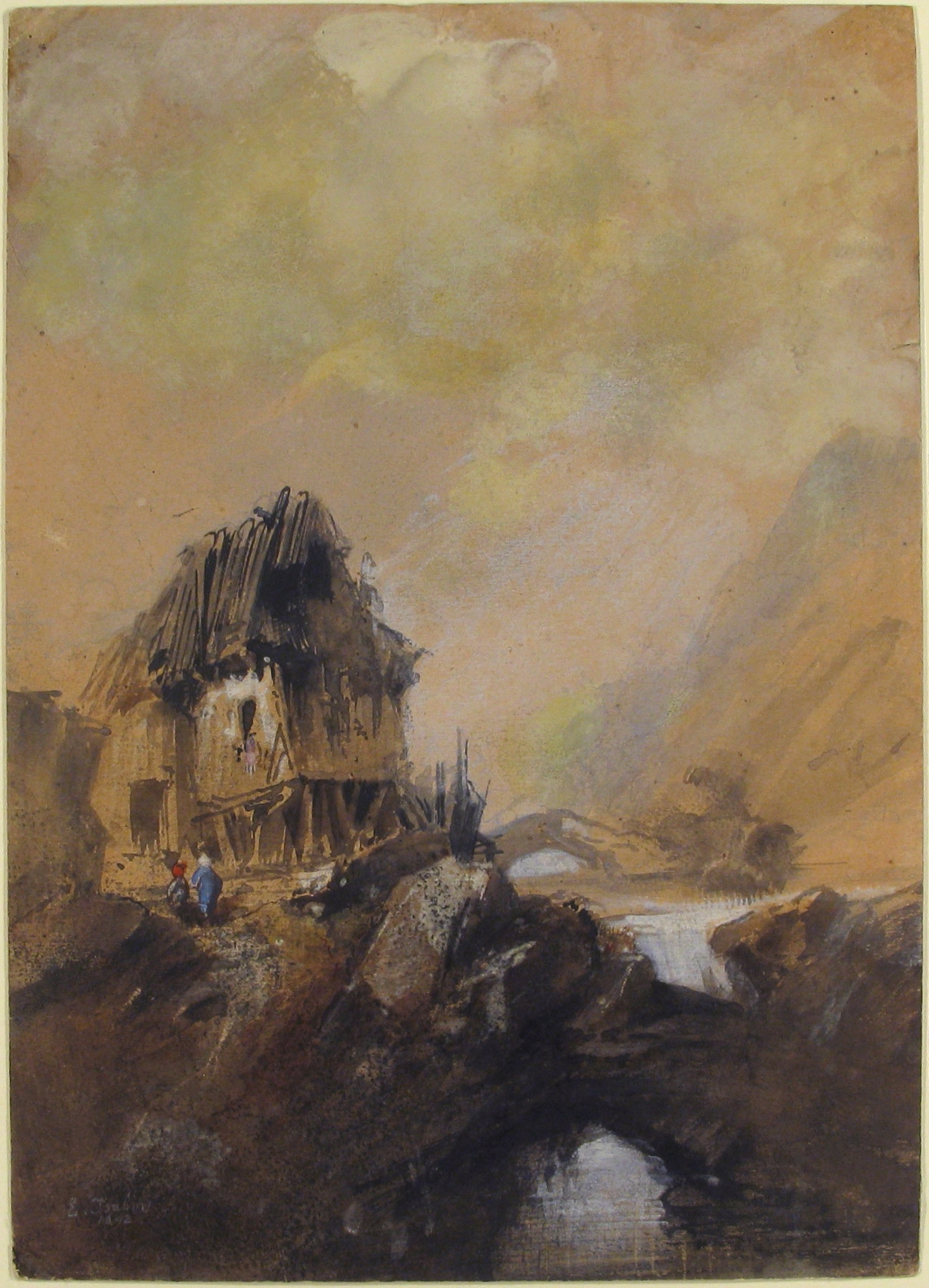 Drawing; Drawings